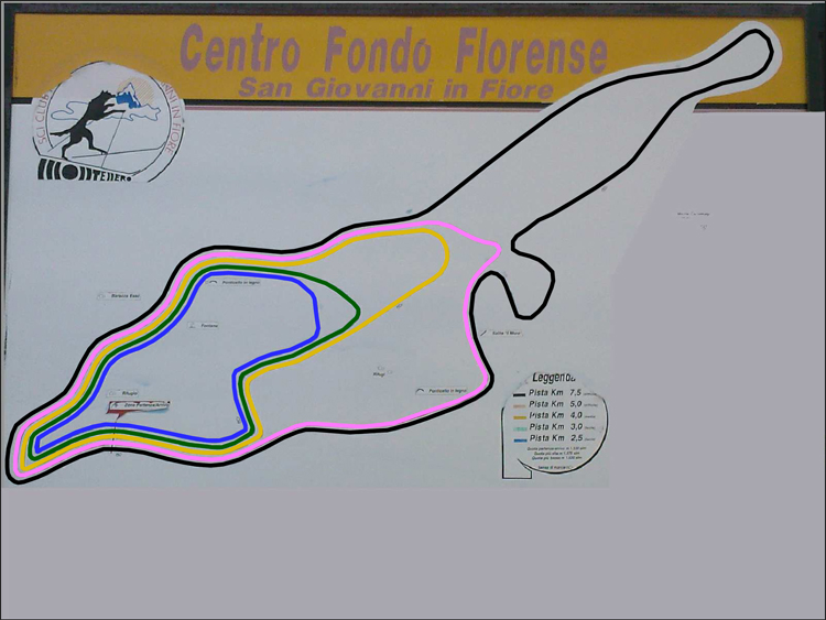 Tabella anelli "Centro Fondo Carlomagno"